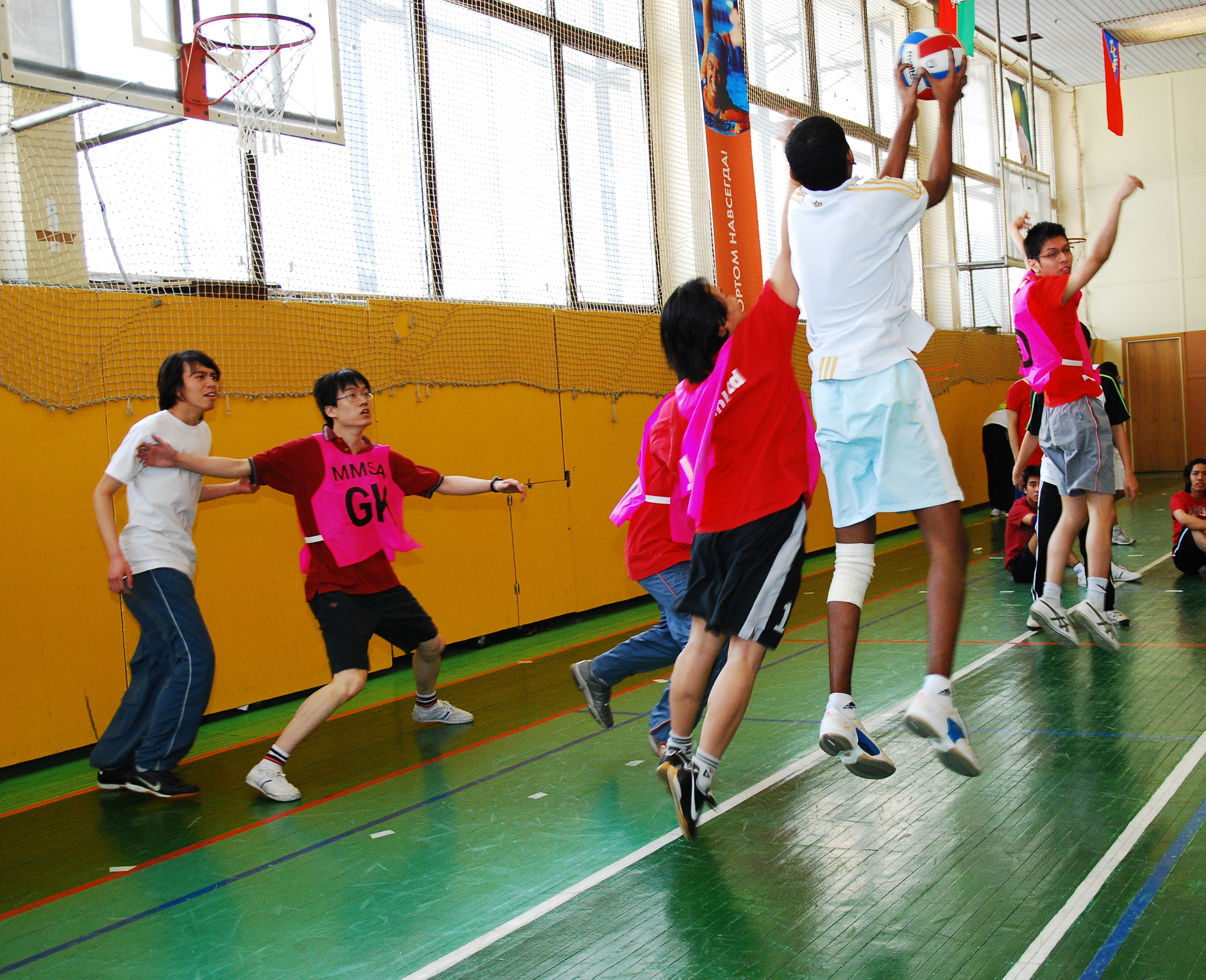 Interbatch Games 2009 RMSA.